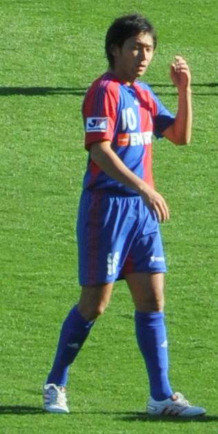 Yohei Kajiyama